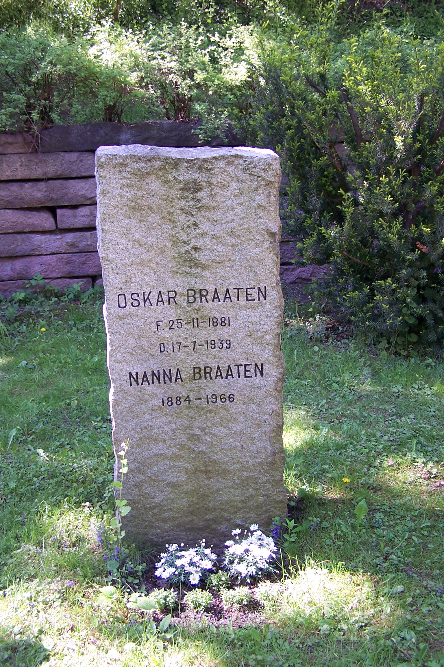 Tomb of Oskar Braaten and Nanna Braaten at Vår Frelsers gravlund, Oslo